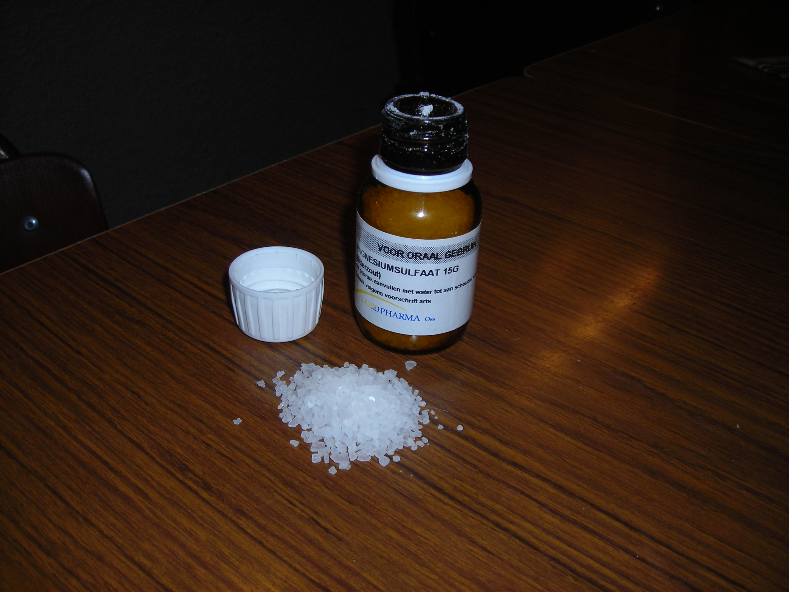 Description Een flesje bitterzoutvoor medisch gebruikDate 16 January 2007Source Zelfgemaakte fotoAuthor Erik1980 Een flesje bitterzoutvoor medisch gebruik